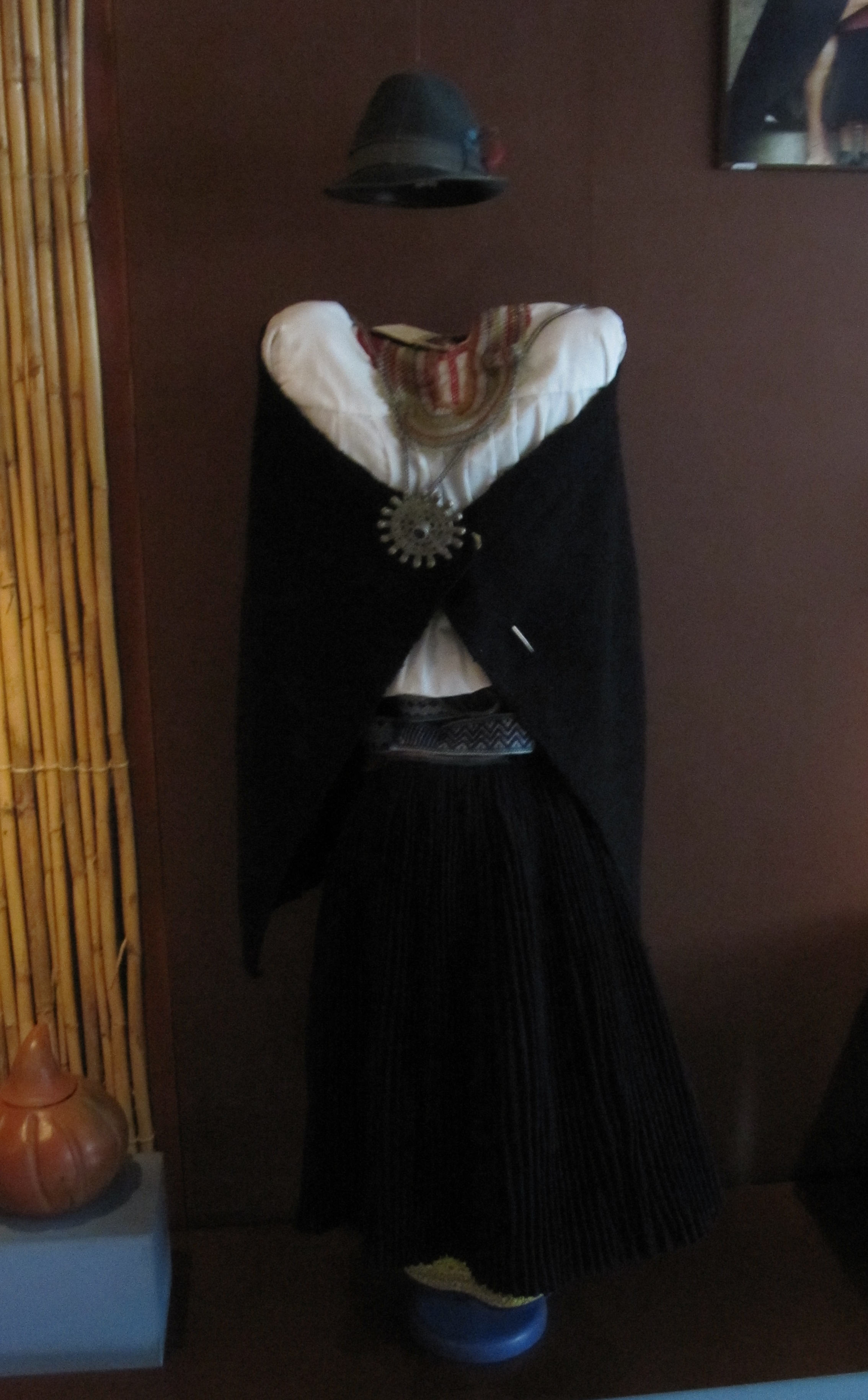 Saraguru dress